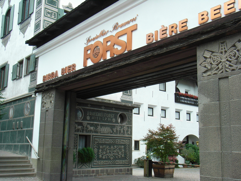 Die Spezialbierbrauerei Forst befindet sich in Algund in der Fraktion Forst. Seit über 150 Jahren werden hier verschiedene Biersorten gebraut, die man dort im Sommer im hauseigenen Braugarten verkosten kann.